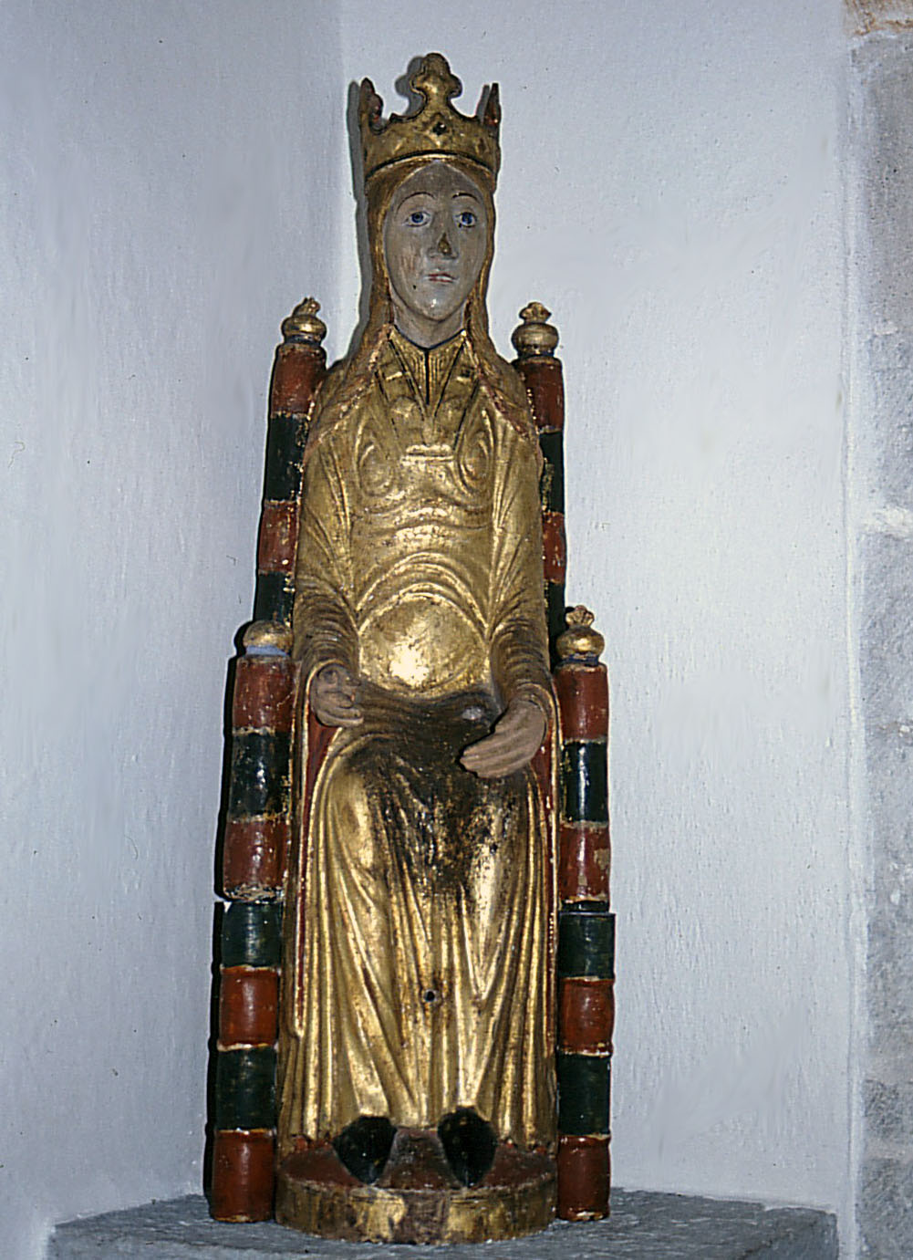 Viklau.Kopia av Viklaumadonnan.